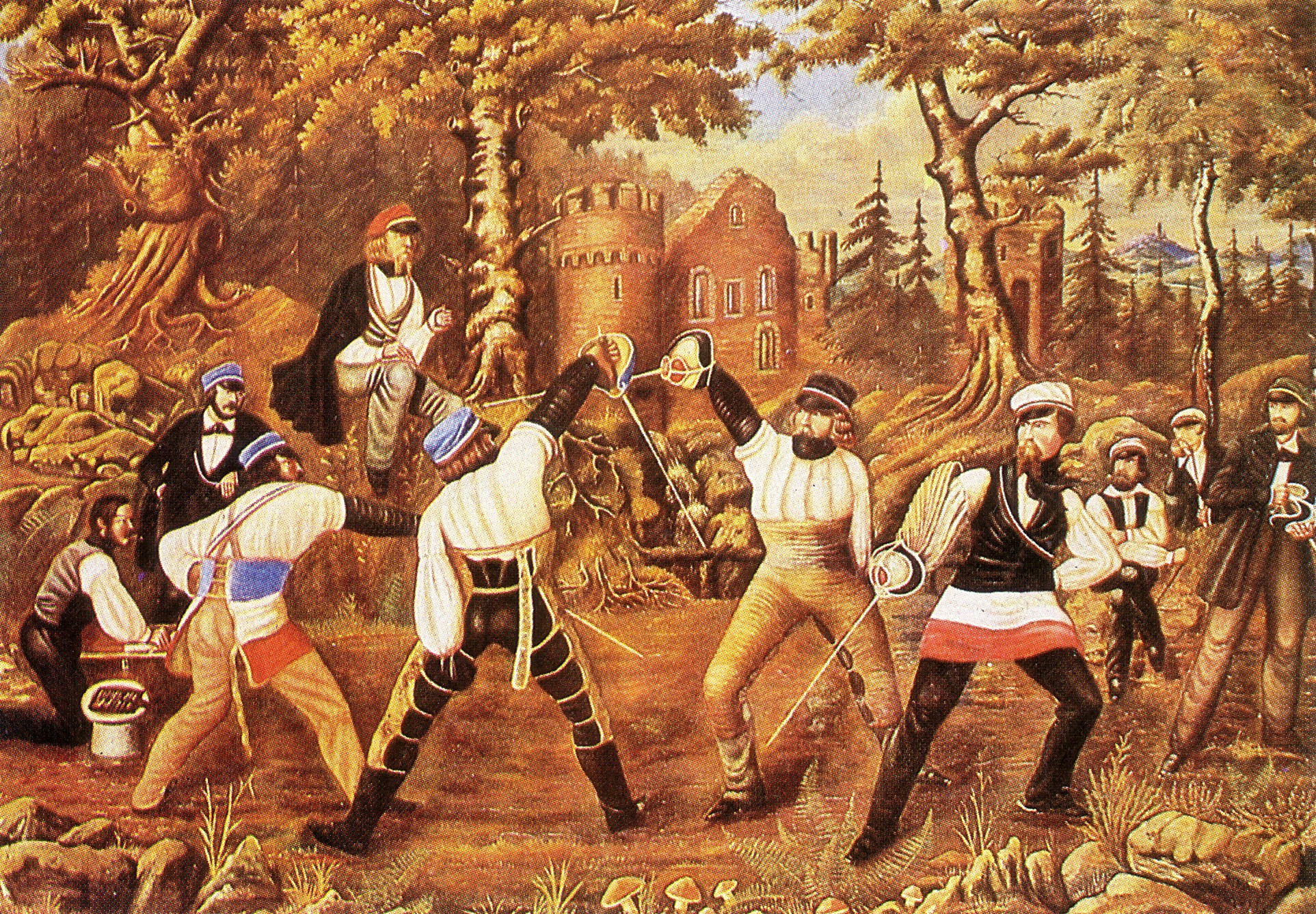 Mensur des Gießener SC (Hassia c/a Rhenania) vor der Badenburg